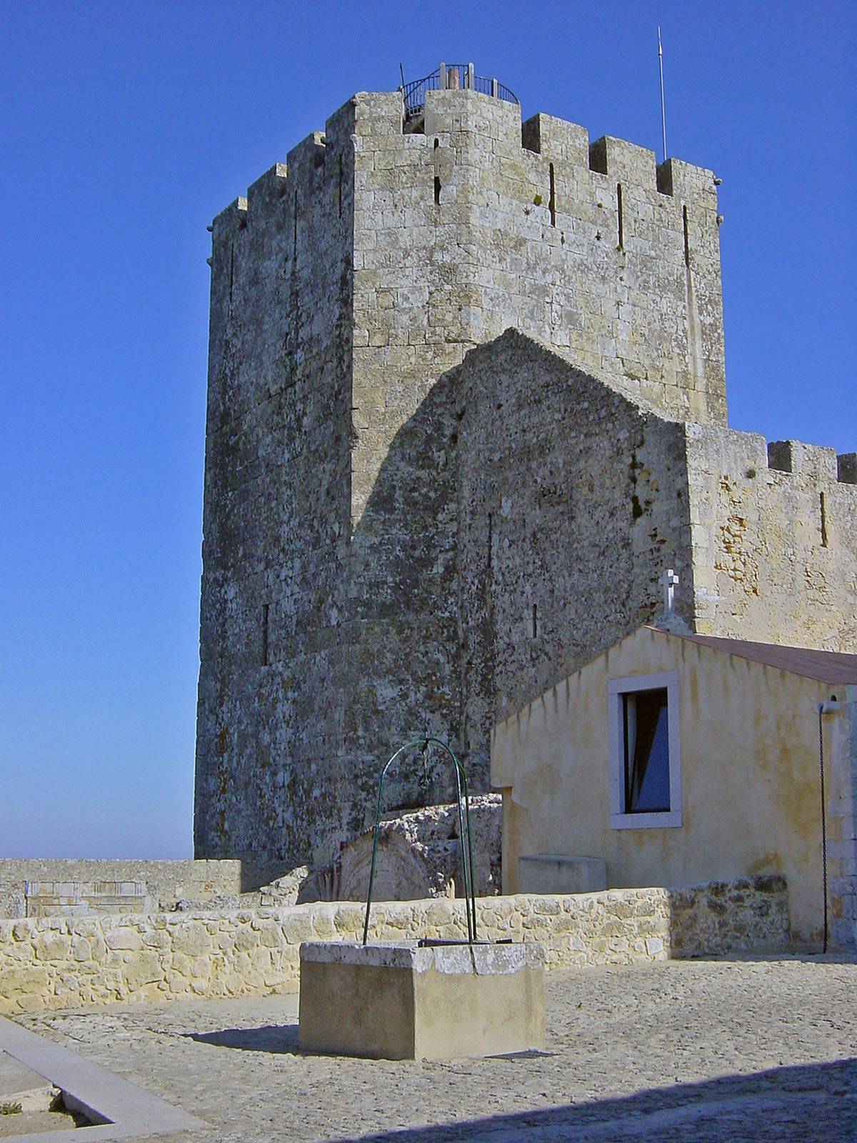 Description